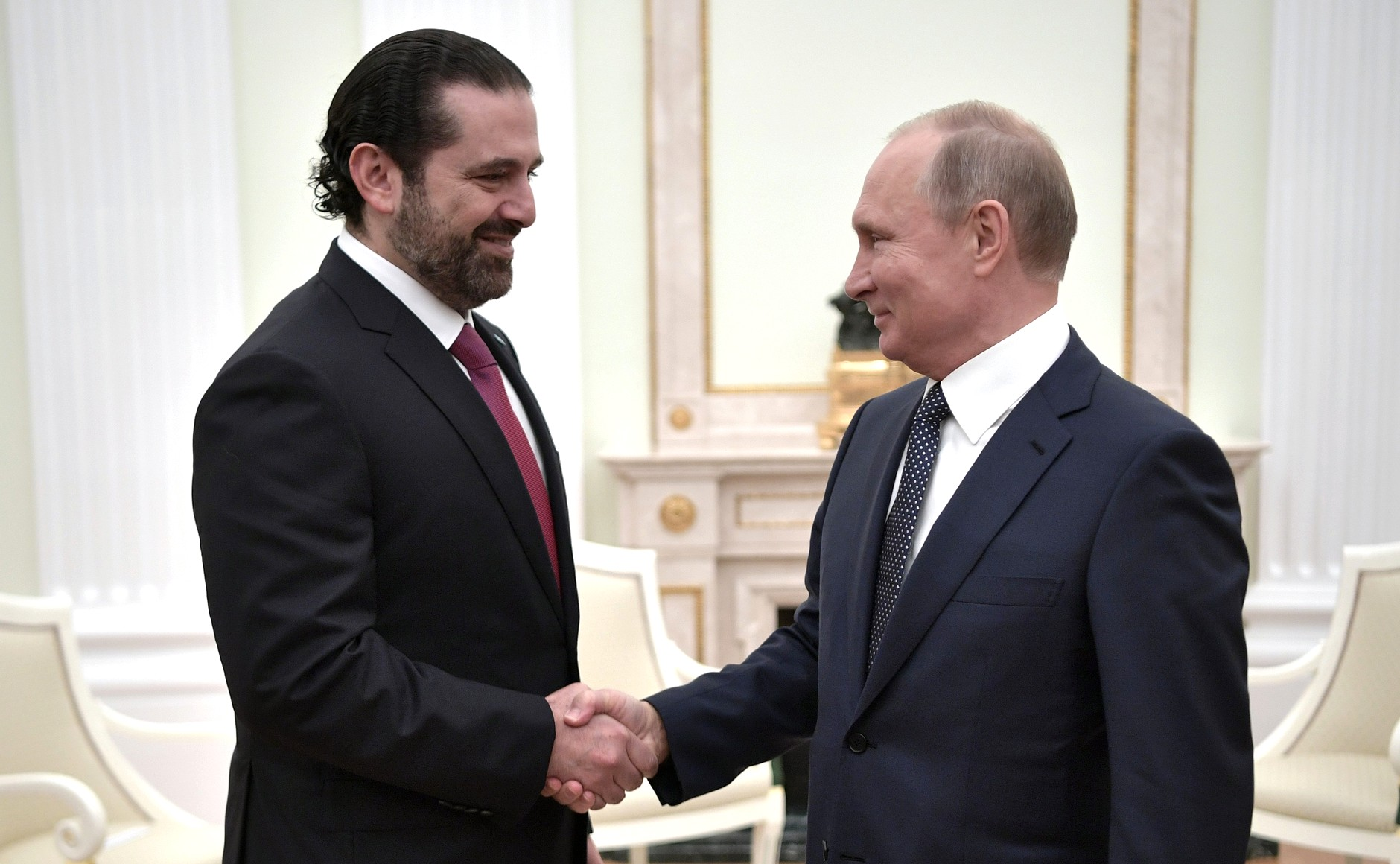 Встреча Президента России Владимира Путина с Председателем Совета министров Ливанской Республики Саадом Харири